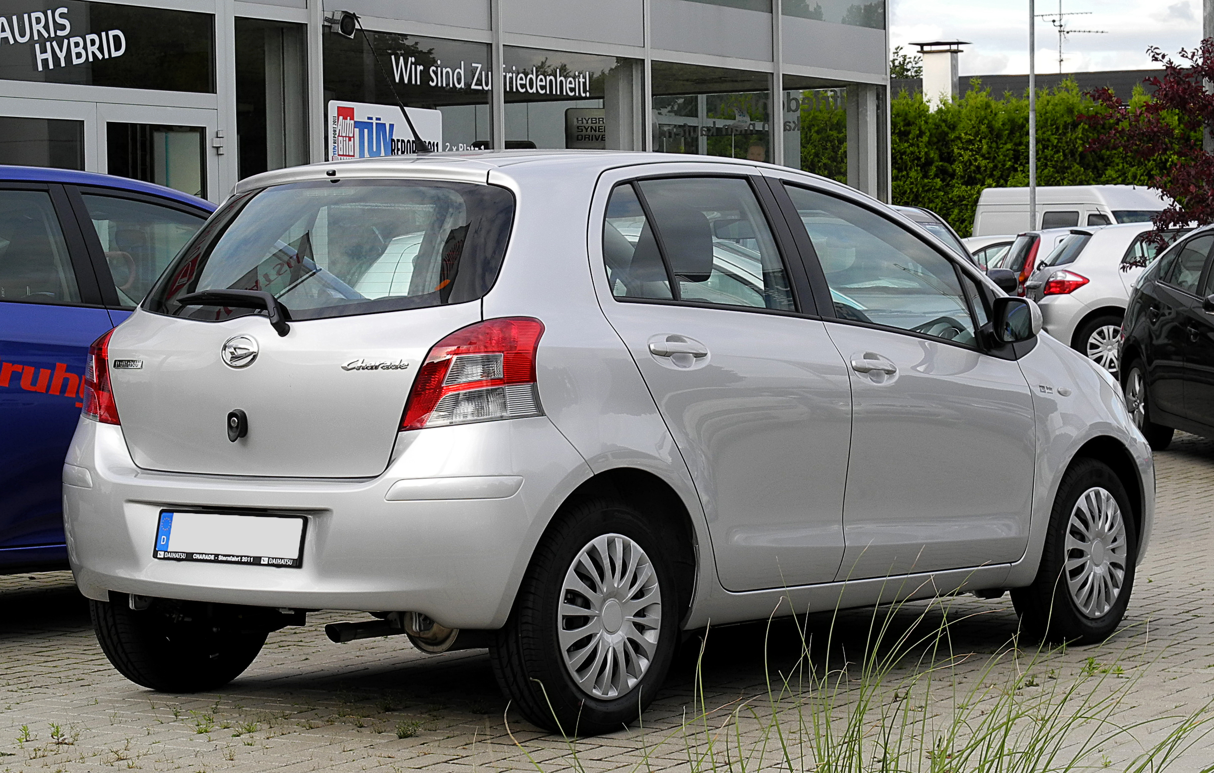 Daihatsu Charade 1.33 Basis (V)